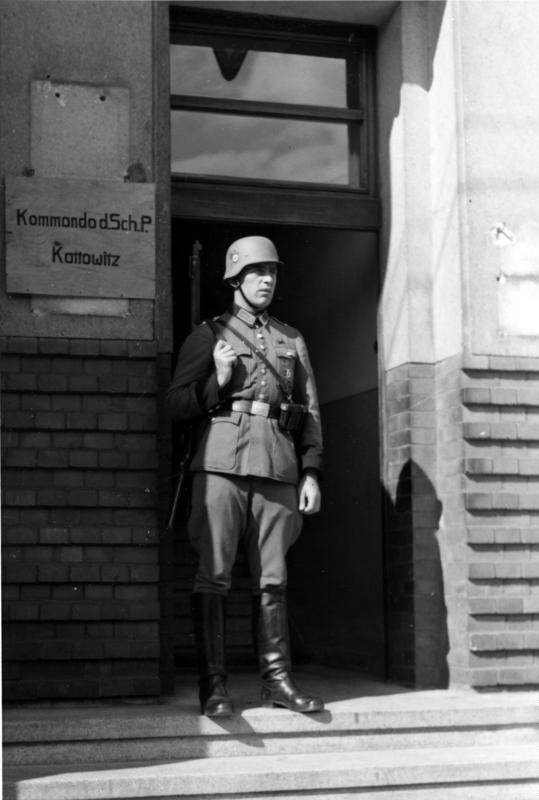 Schutz-Polizei Posten